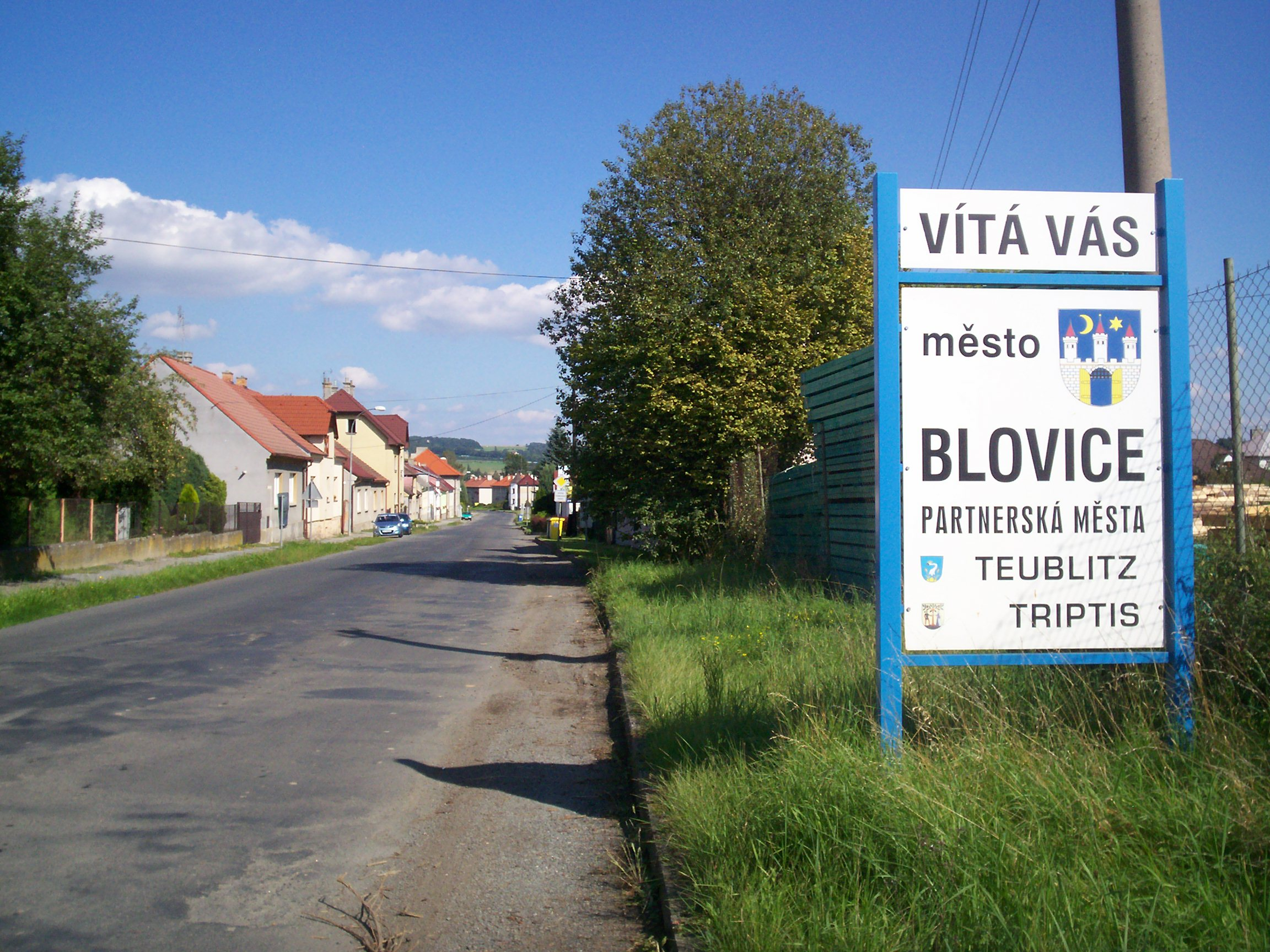 Vjezd do Blovic